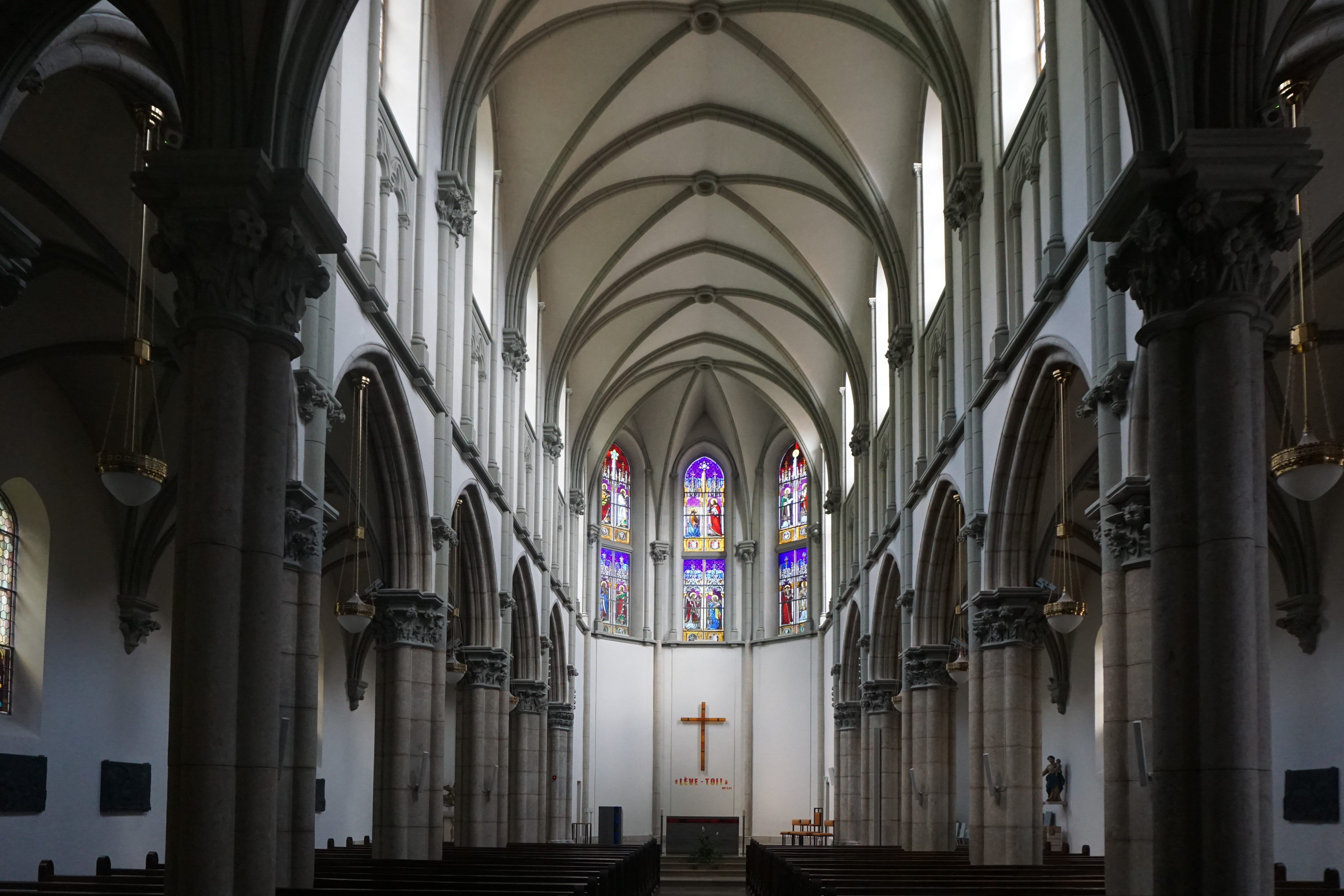 Saint-Martin Innenraum mit Chor